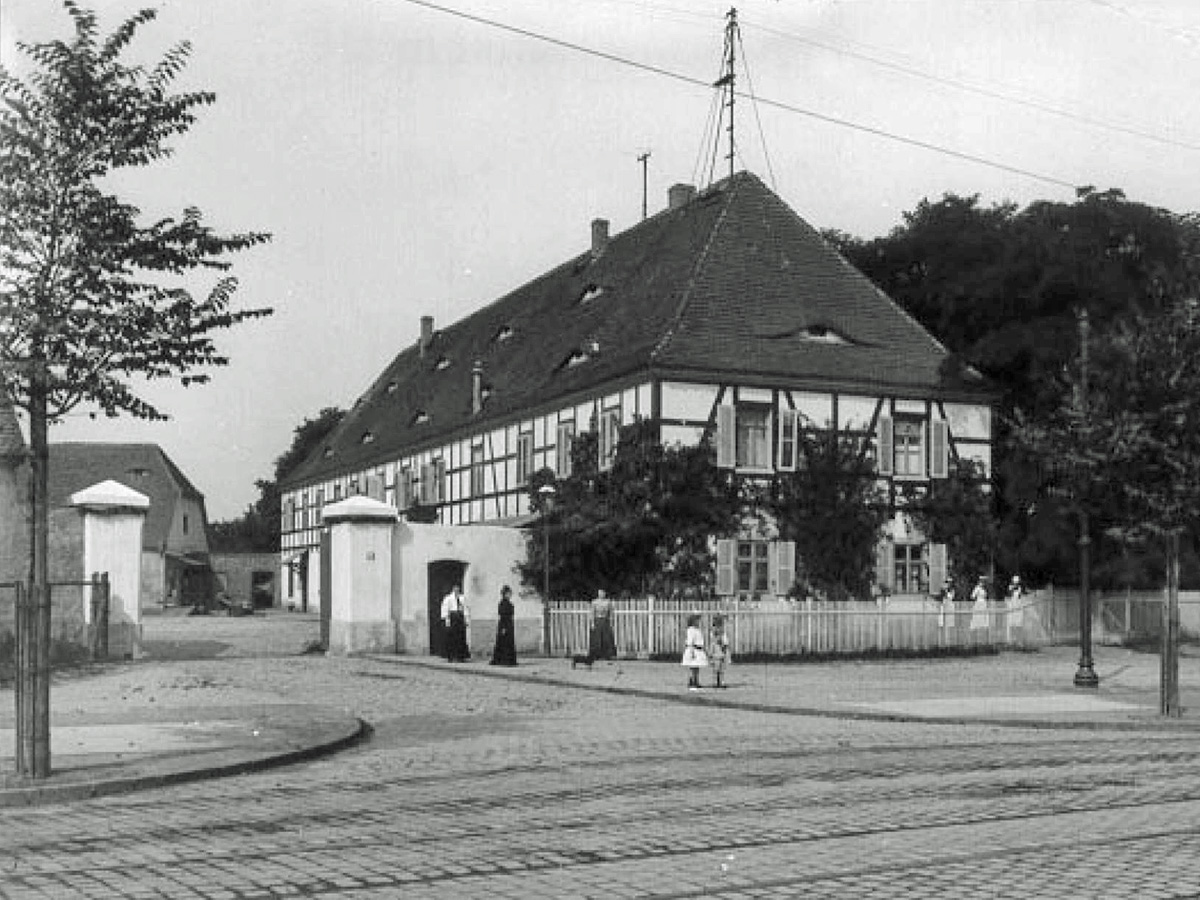 Das Gut Thonberg um 1900. Die Gebäude wurde zur Vergrößerung des Messegeländes abgerissen, zuletzt das Wohnhaus 1936